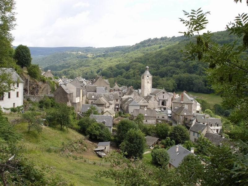 Saint chély d'Aubrac source lecybersurfeur